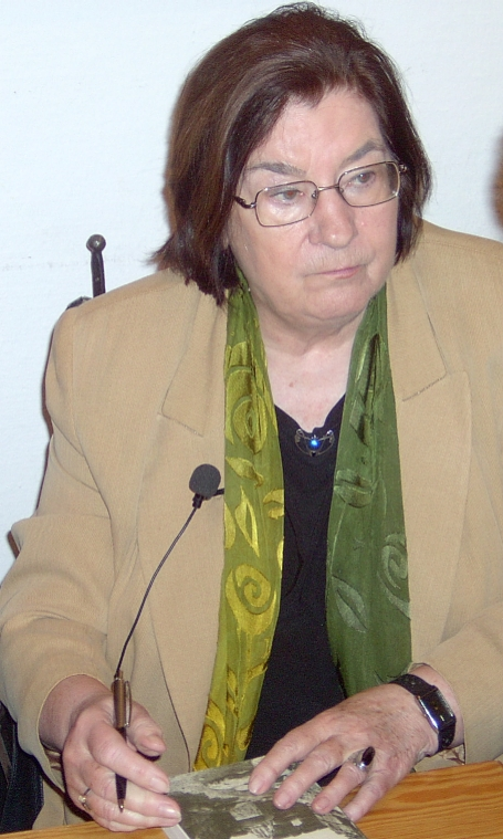 Die Schriftstellerin Christa Wolf während einer Buchlesung in Berlin-Mitte, März 2007